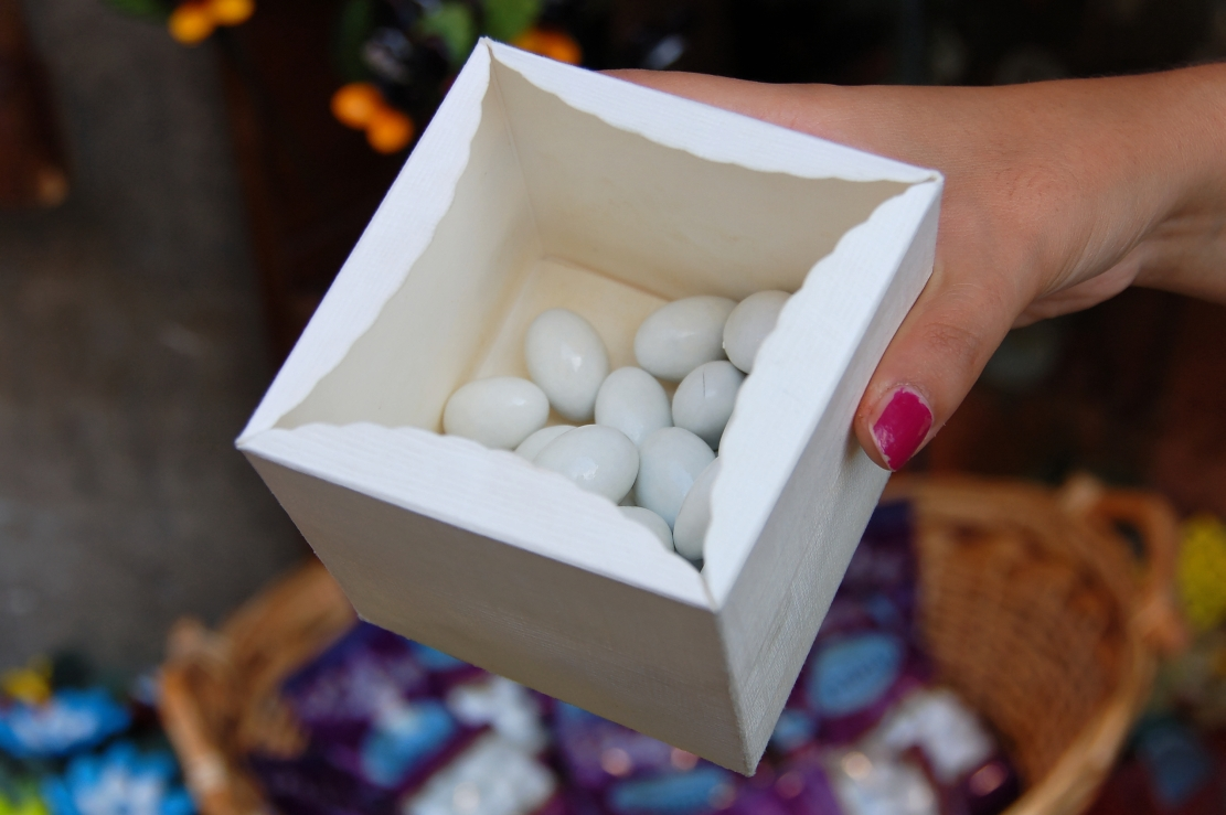 Sulmona 2011